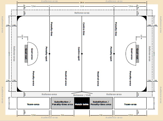 Campo da Gioco regolamentare di Wheelchair Hockey